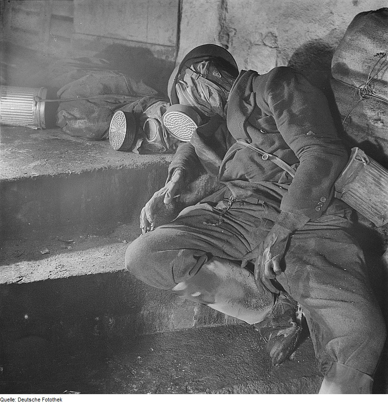 Original image description from the Deutsche Fotothek Leiche mit Gasmaske und Stahlhelm in einem Luftschutzkeller